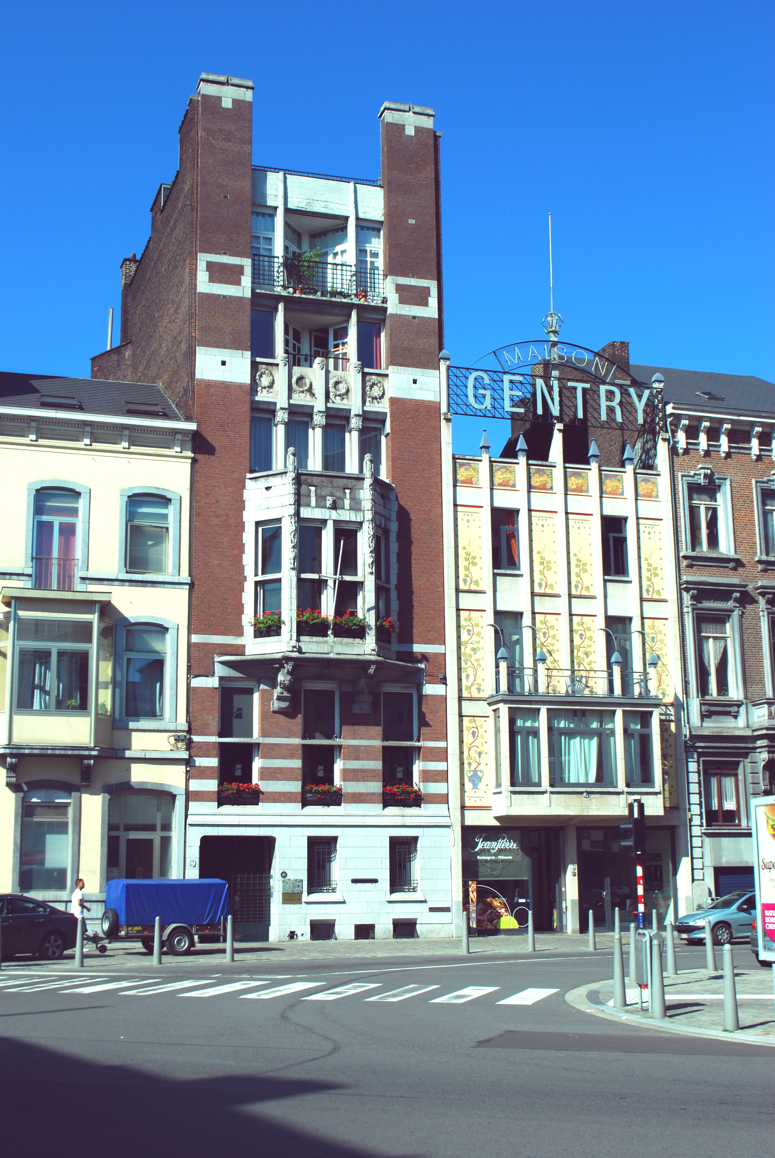 Vue de la rue Dartois, à Liège.